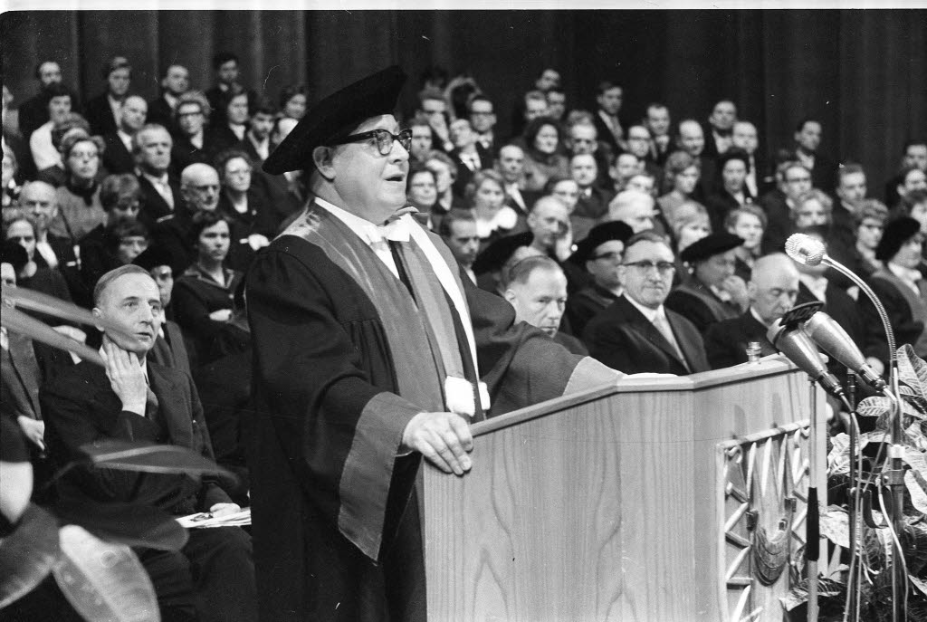 Festakt im Stadttheater. Im Bild IfW-Direktor Prof. Dr. Erich Schneider am Rednerpult.